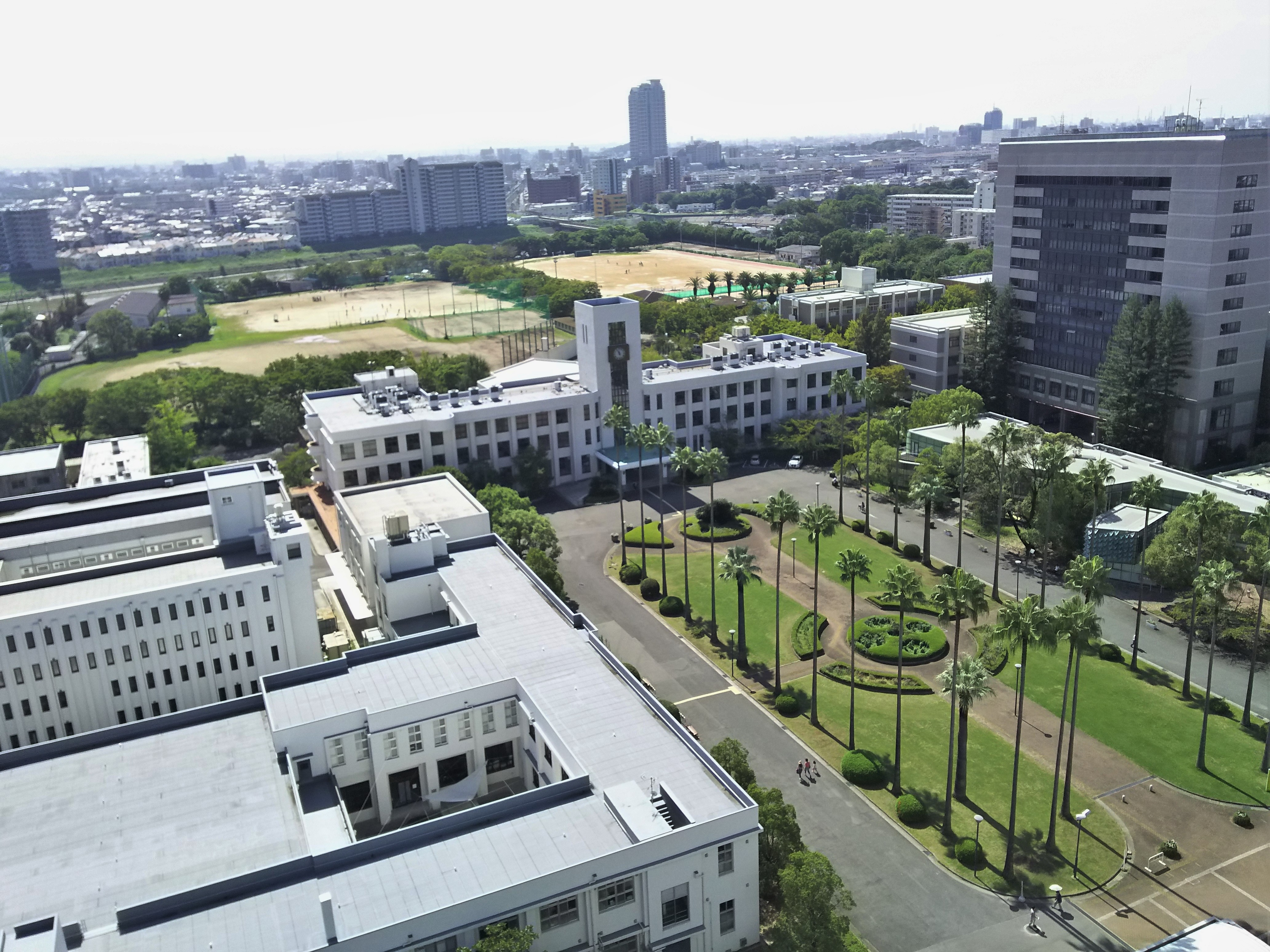 大阪市立大学杉本キャンパス本館地区（大阪市住吉区）学術総合情報センター屋上より撮影